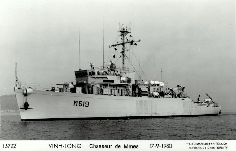 M619 VINH LONG dragueur de mines français de type MSO